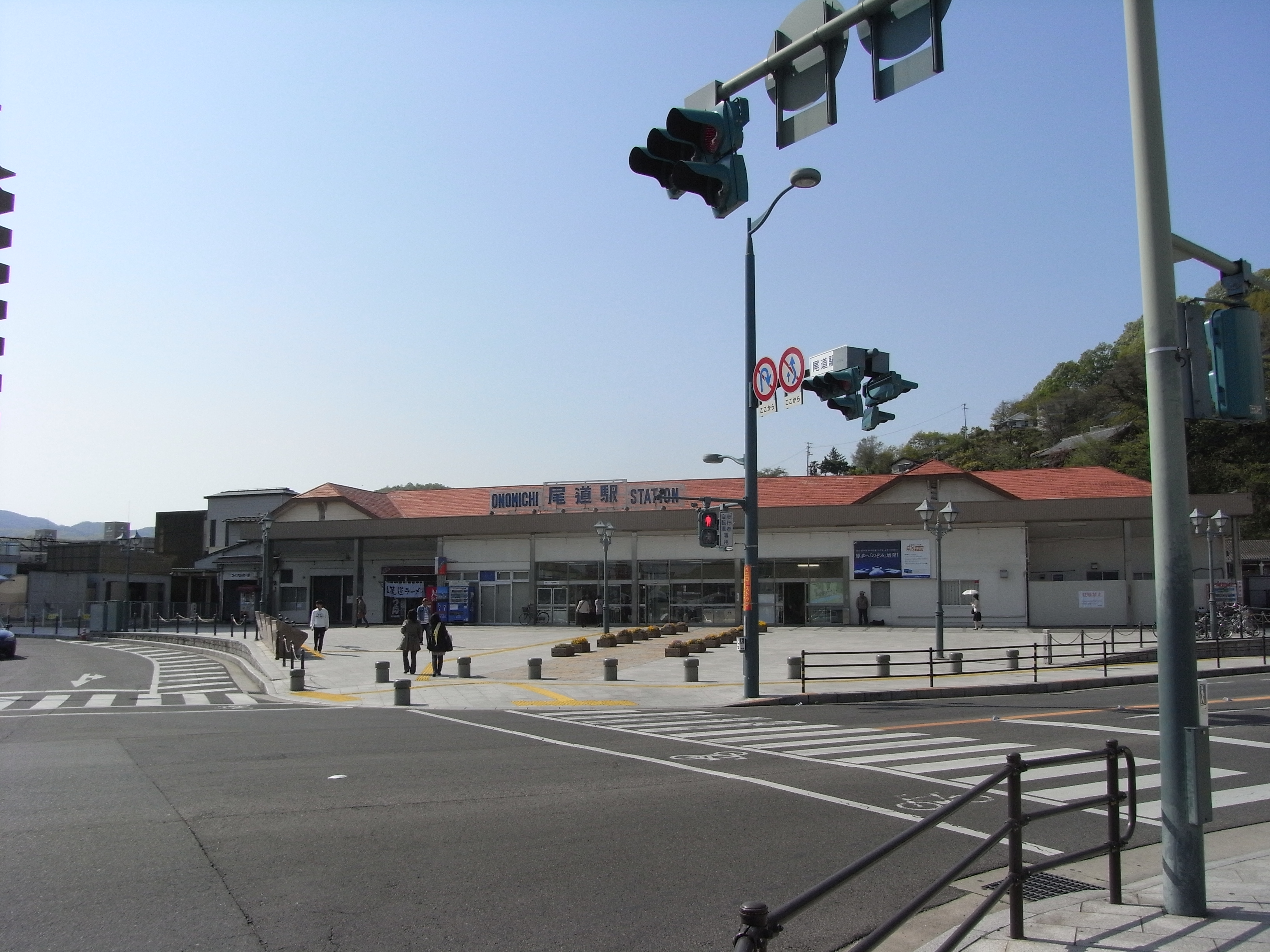 Mazda FAMILIA(尾道駅)